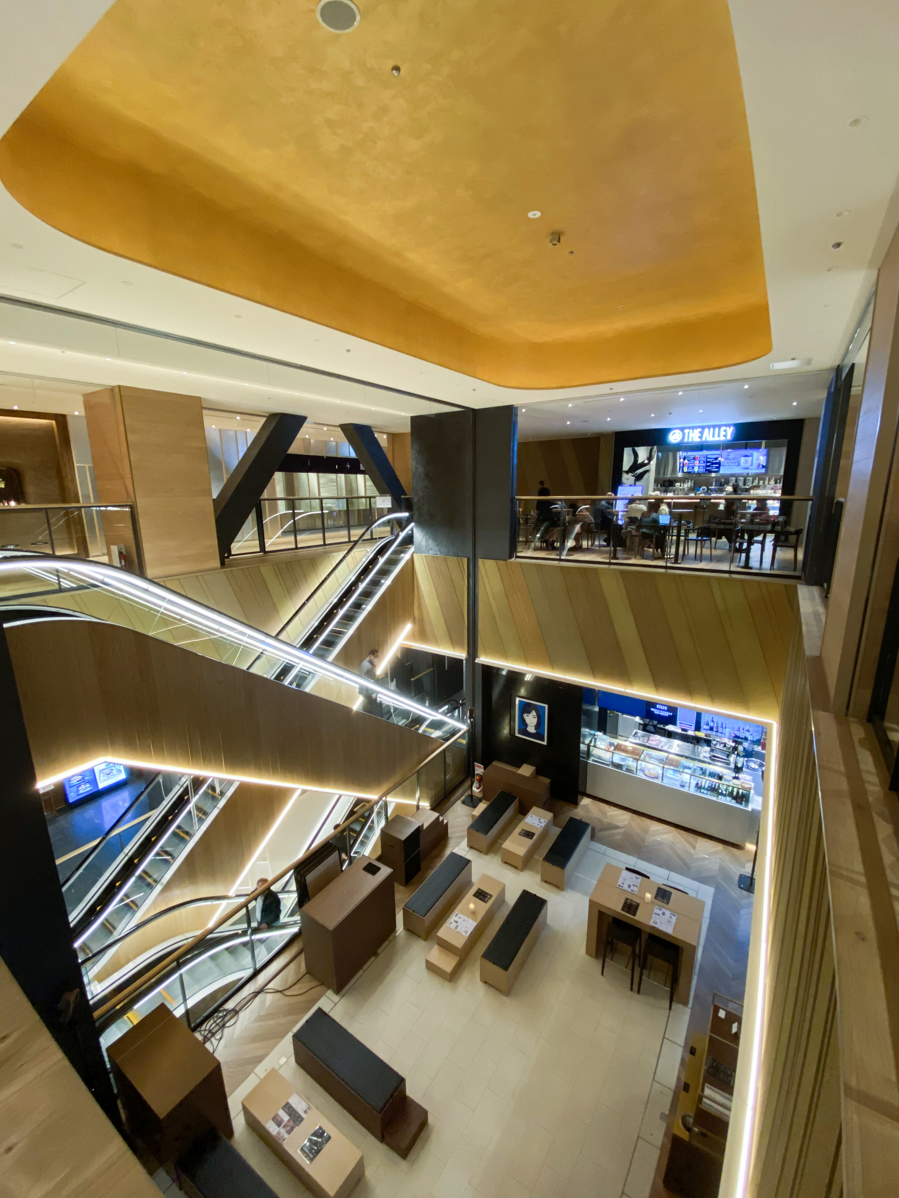 Tokyu Plaza Suibuya Level 6 Void